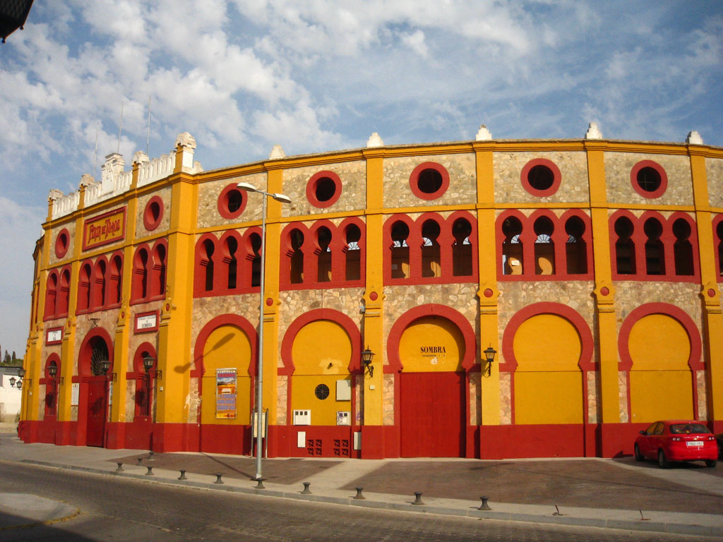 Plaza de Toros de El Pino de Sanlúcar de Barrameda